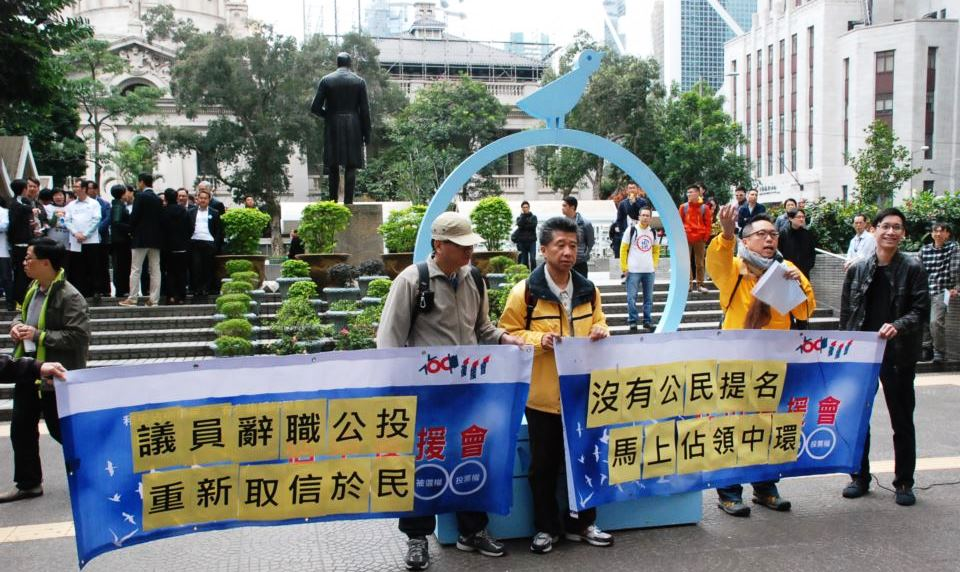 人民力量成員譚得志帶領一群示威者狙擊民主黨參與佔中誓師儀式